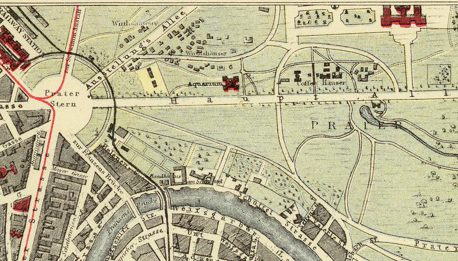 Wien, Prater, Lage des ehemaligen Aquariums bzw. Vivariums